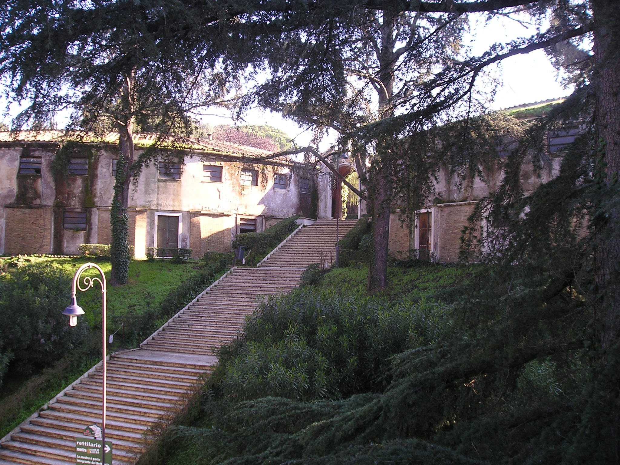 Vecchio padiglione pappagalli Bioparco di Roma